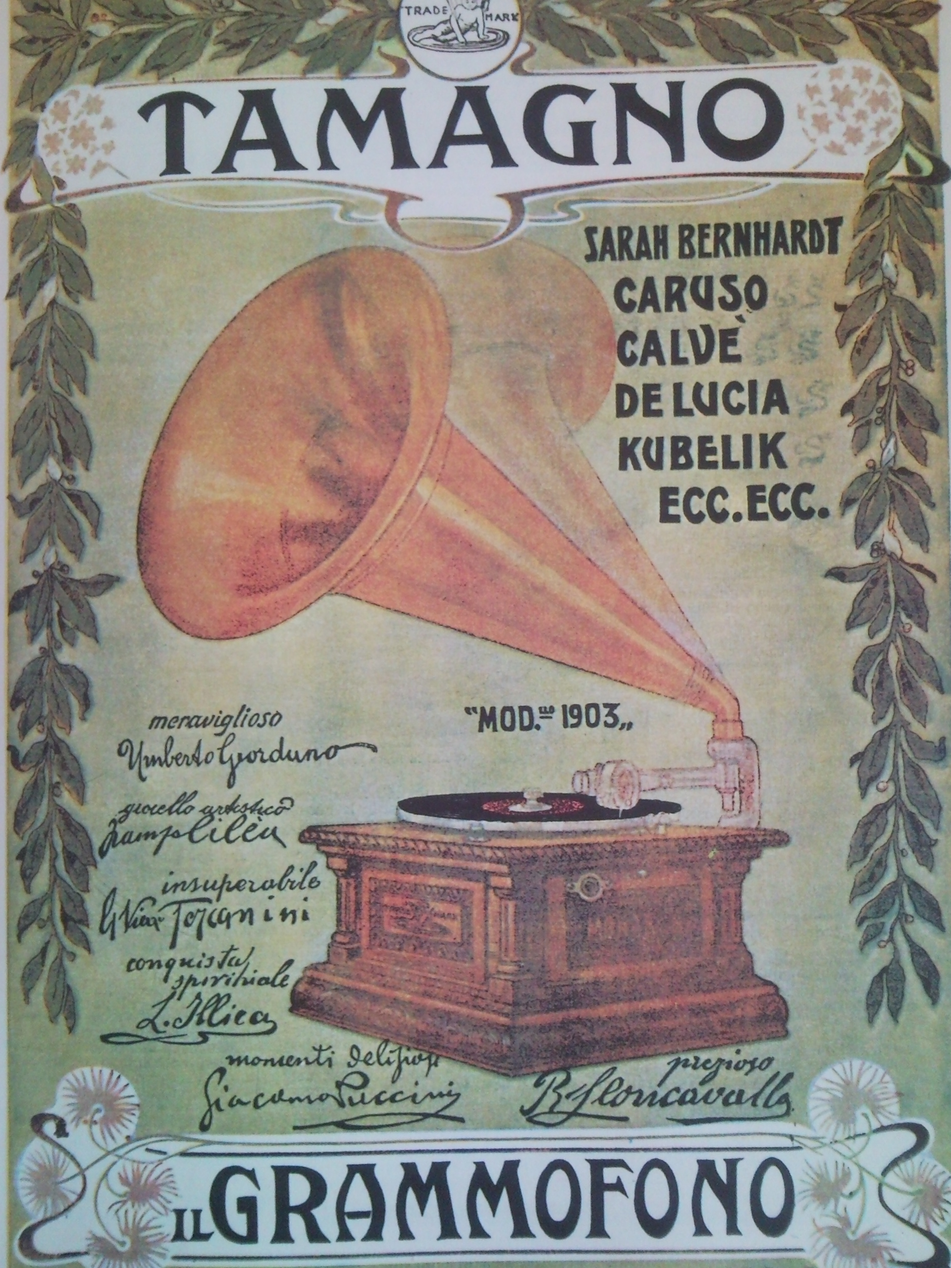 Manifesto pubblicitario del Grammofono Tamagno mod. 1903, in Le Copertine della Domenica. Settant'anni tra cronaca e storia nelle immagini dei grandi disegnatori della Domenica del Corriere, 1899-1904, p. 129 (AS Avellino)